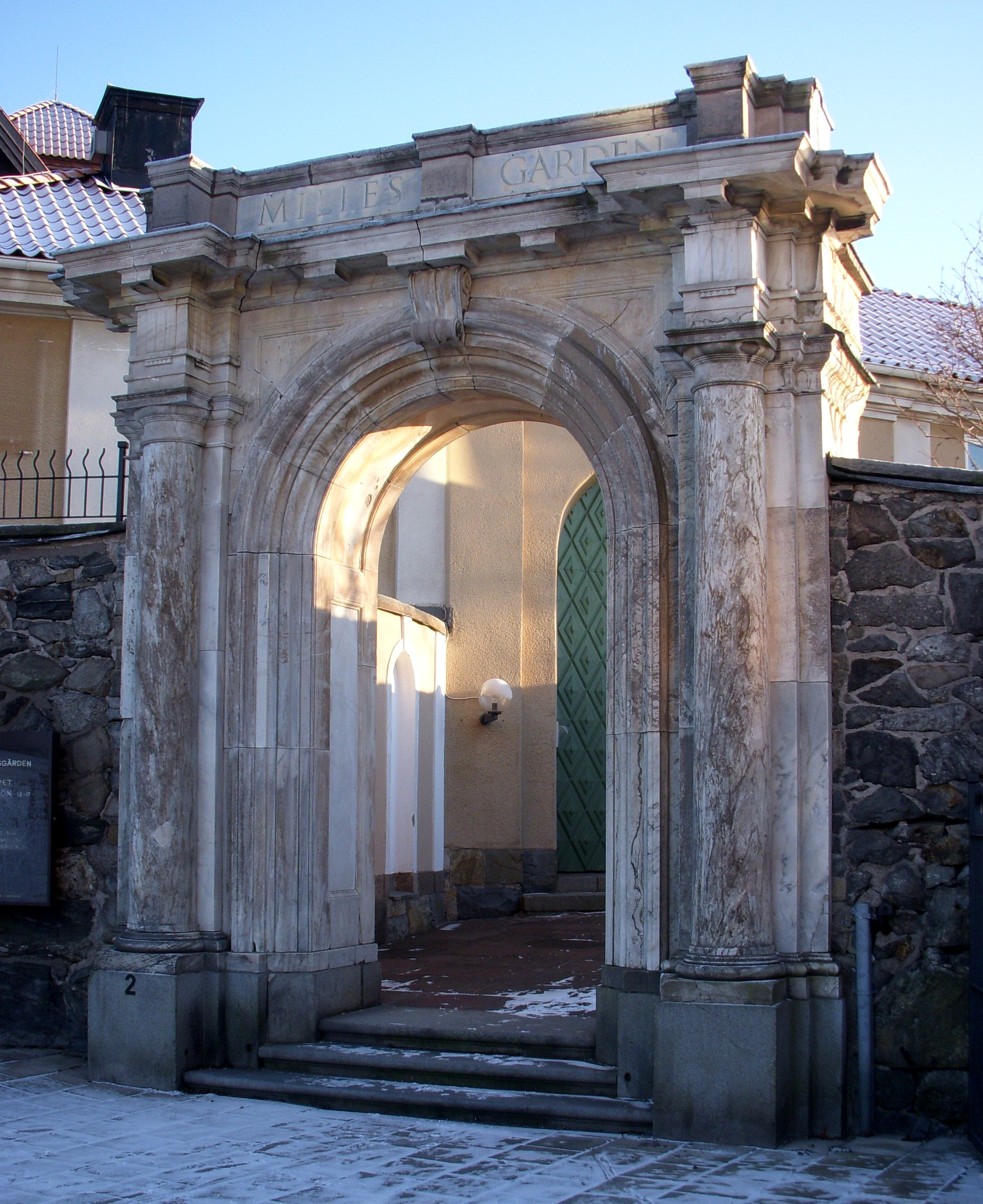 Hotel Rydbergs gamla portal vid Millesgården på Lidingö